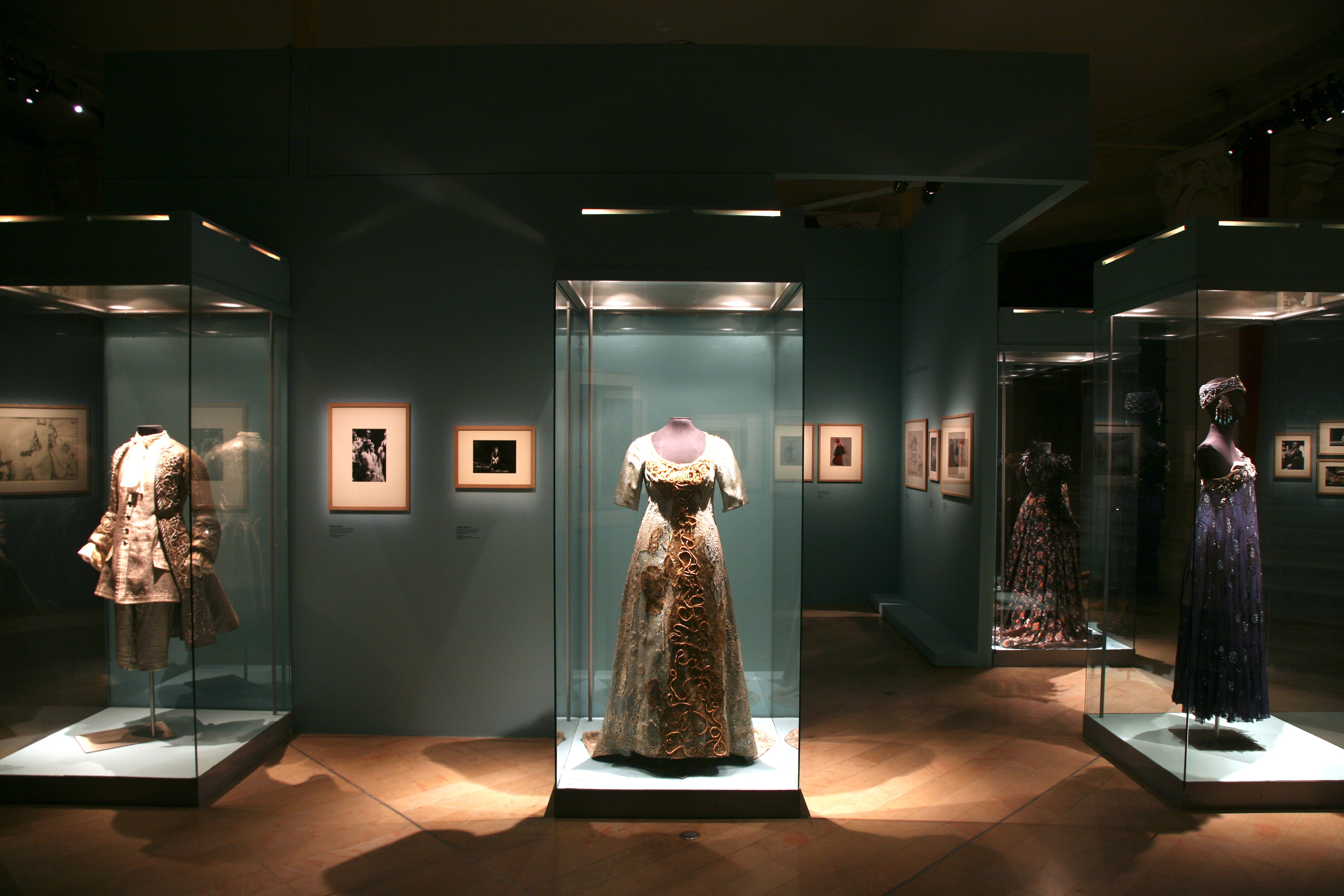 Né à Zurich en 1910, mort à Paris en 1999, Rolf Liebermann fut l’une des personnalités musicales majeures du XXe siècle. Compositeur, chef d’orchestre, metteur en scène, il dirigea successivement les Opéras de Hambourg (1959-1972) et de Paris (1973-1980). Au Palais Garnier, son nom est attaché, entre autres, aux Noces de Figaro dans la mise en scène de Giorgio Strehler (production reprise cette saison) ou à la création mondiale de la version en trois actes de Lulu dirigée par Pierre Boulez. A l’occasion du centenaire de sa naissance, le Staatsoper de Hambourg s’associe à la Bibliothèque-Musée de l’Opéra et à l’Opéra de Paris pour rendre hommage à cette personnalité d’exception. COMISSARIAT : Mathis Auclair conservateur en chef à la Bibliothèque-musée de l'Opéra Christophe Ghristi directeur de la dramaturgie à l'Opéra national de Paris Martine Kahane directrice du Centre national du costume de scène de Moulins Aurélien Poidevin attaché temporaire d'enseignement et de recherche à l'Université ParisVIII